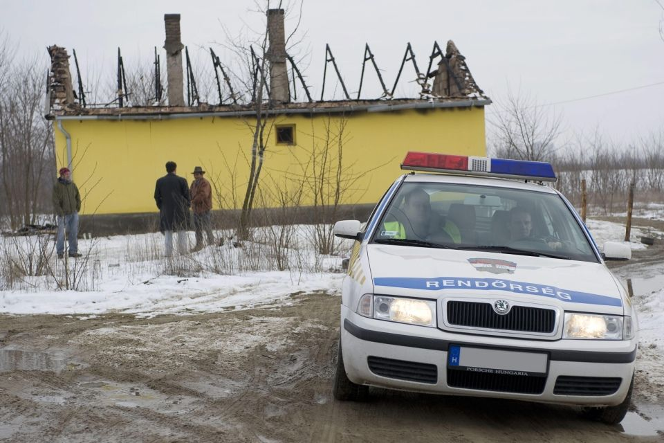 Tatárszentgyörgy romagyilkosság